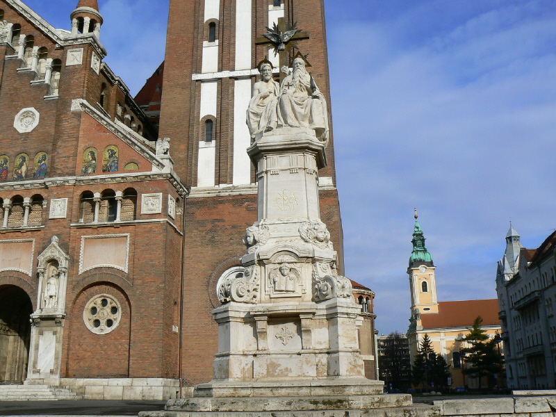 A Dömötör-templom elött állították föl 1896-ban. A mai helyére 1940-ben helyezték át. A neobarokk talapzaton, fölül a Szentháromság jelképei láthatók. A rekonstrukció fővállalkozója Bánvölgyi László szobrászművész, restaurátor volt, segítői a Tömörkény Gimnázium végzős szobrászhallgatói, valamint két fiatal szobrász Székó Gábor és Barta András. A Nemzeti Kulturális Örökség Minisztériuma támogatta. Az eredeti szoborcsoport az Országos Műemlékfelügyelőség hozzájárulásával restaurálva lett és 1998-óta a Dóm altemplomát díszíti.